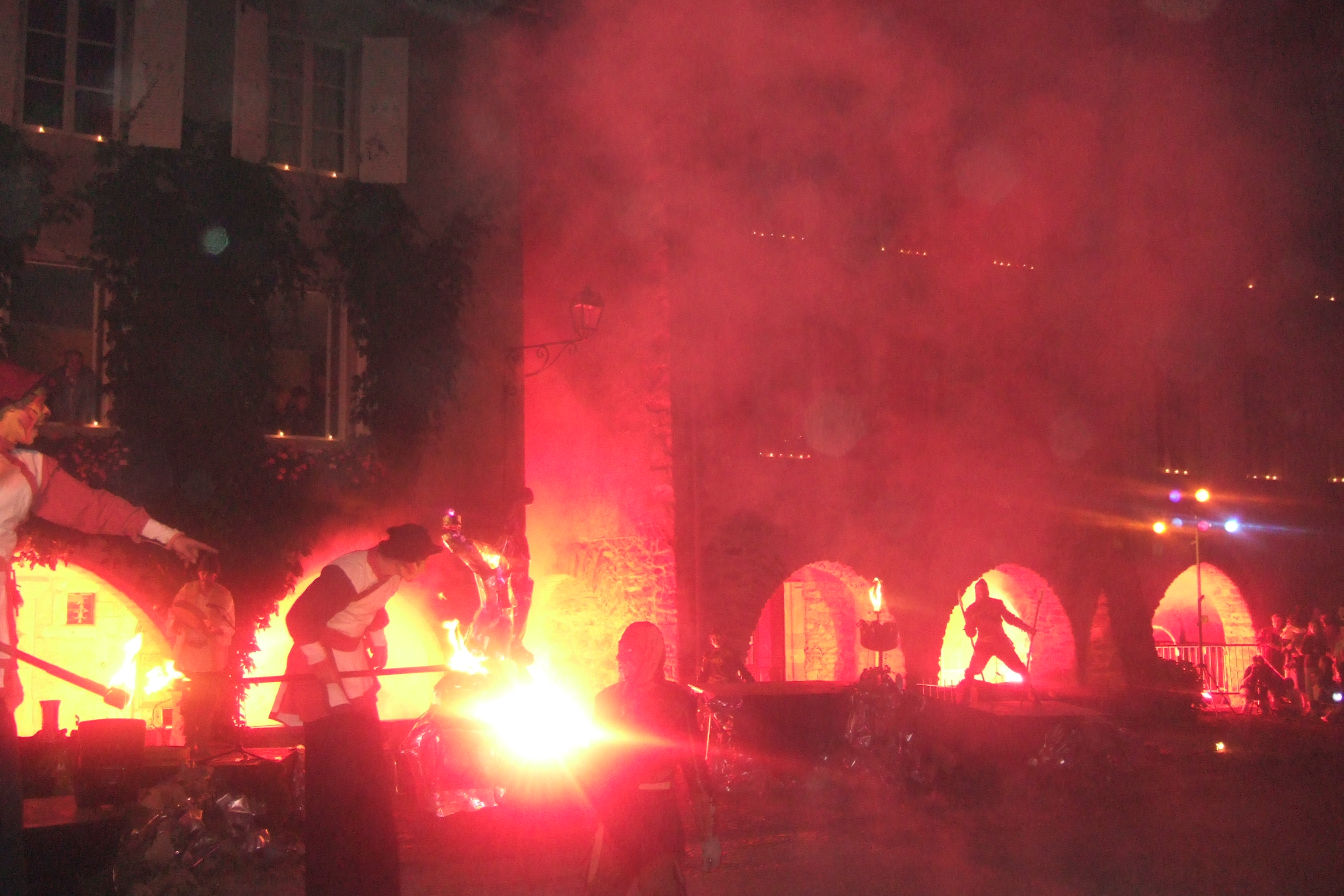 Sauveterre-de-Rouergue : fête de la lumière 2005, feux de Bengale sous les arcades